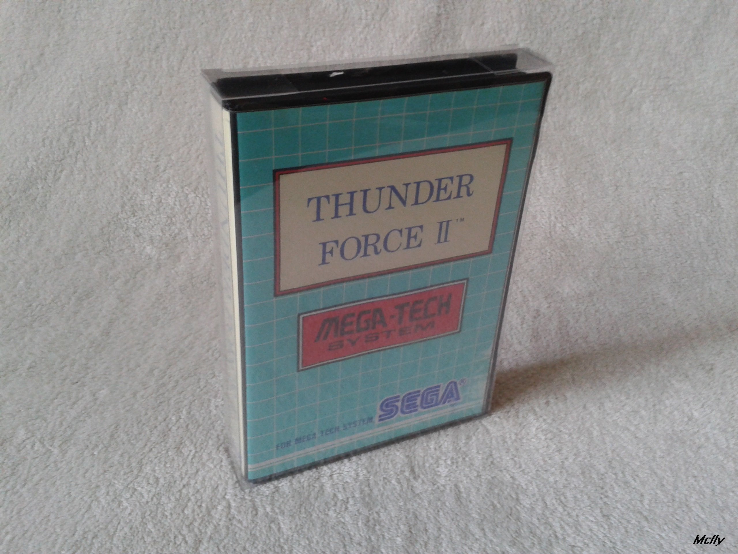 tf2 version arcade